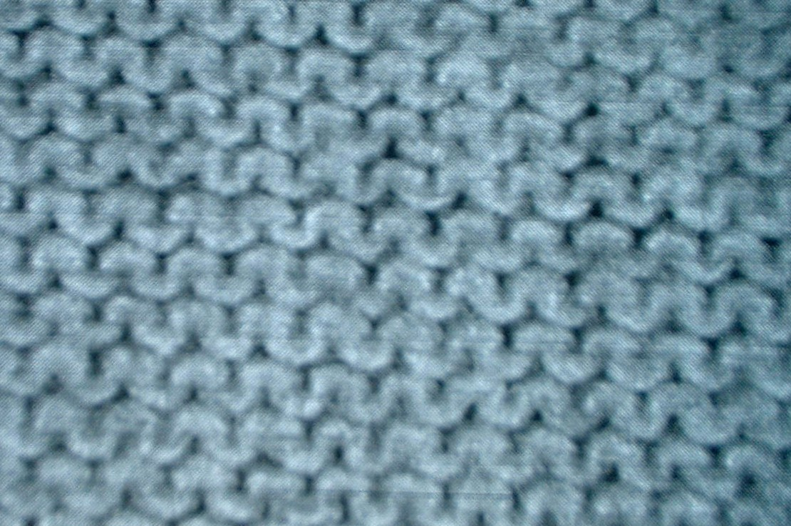 Glatte RL-Bindung im Gestrick (linke Seite)